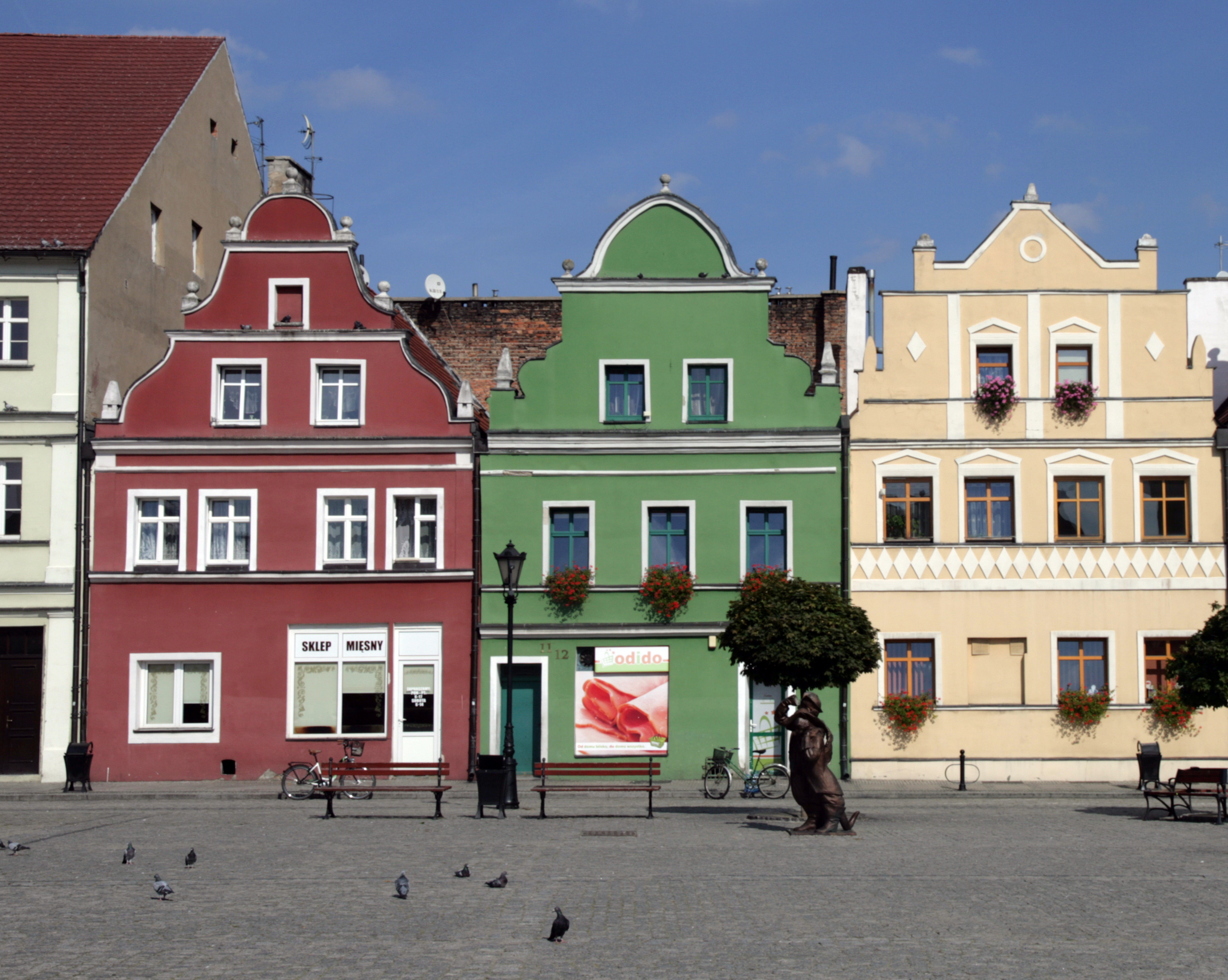 Dom, mur., XVIII, 1910, 1970-1971, Bytom Odrzański, Bytom Odrzański, Rynek 12 04.1963.